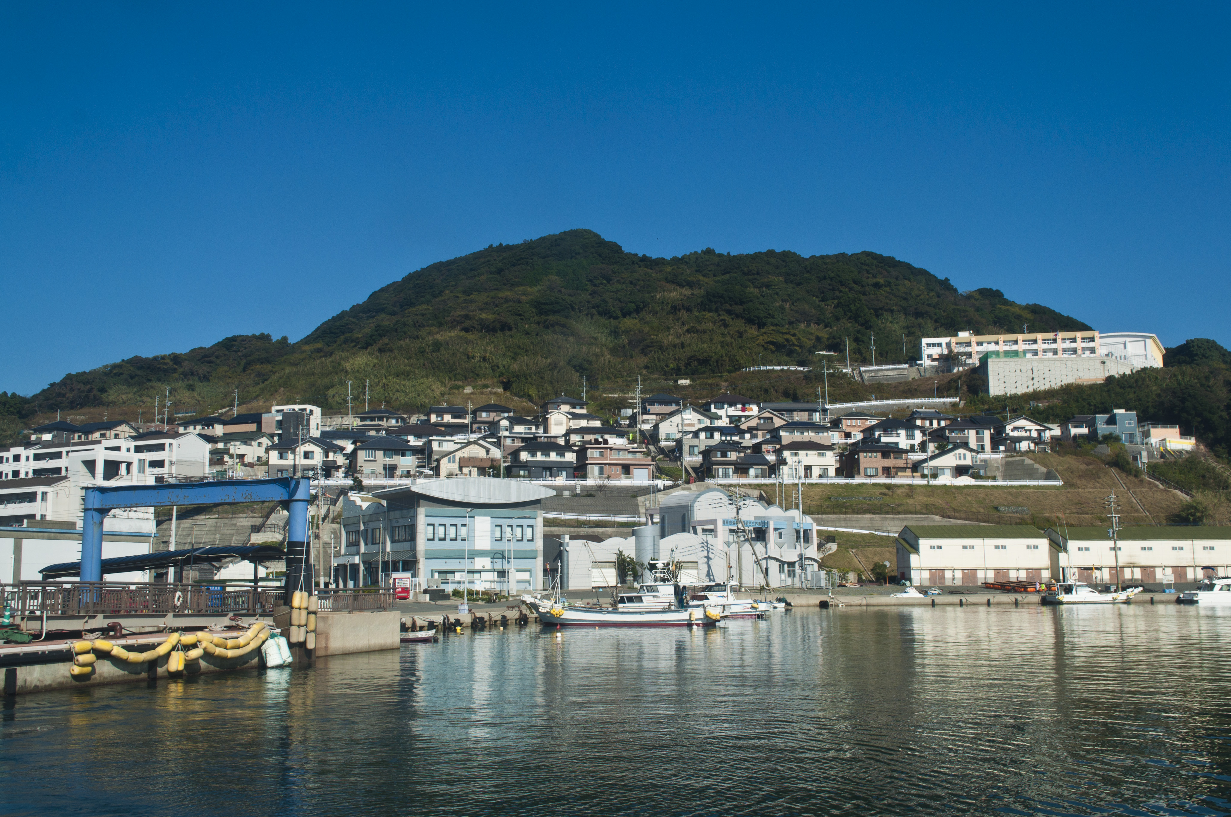 漁港から眺める玄界島の集落